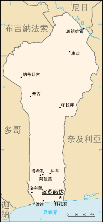 貝南地圖。